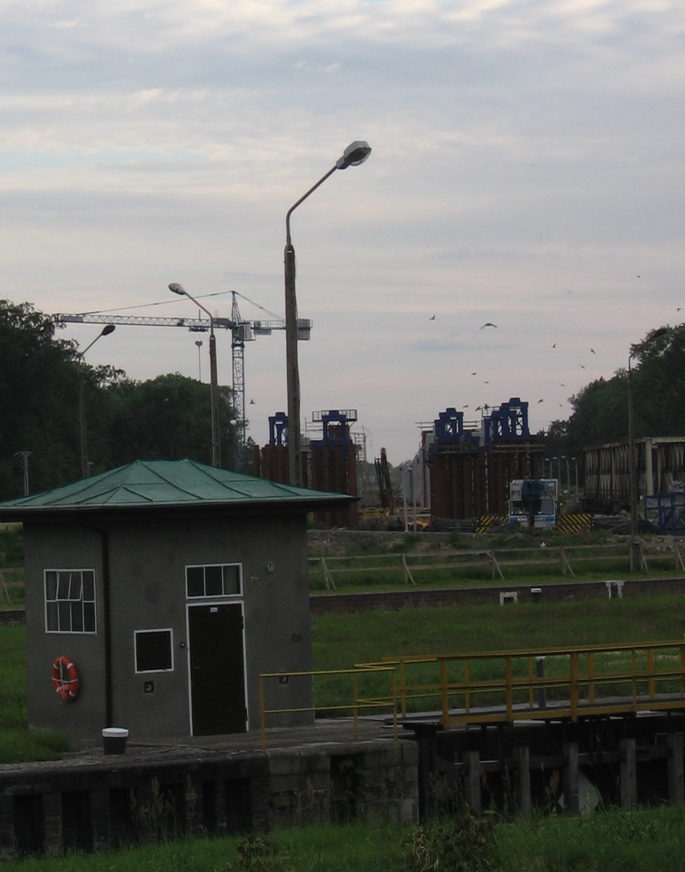 Budowa Mostu Rędzińskiego we Wrocławiu na Autostradowej Obwodnicy Wrocławia (A8), widok od strony Rędzina; na pierwszym planie mały budynek obsługi znajdującej się tu także Śluzy Rędzińskiej